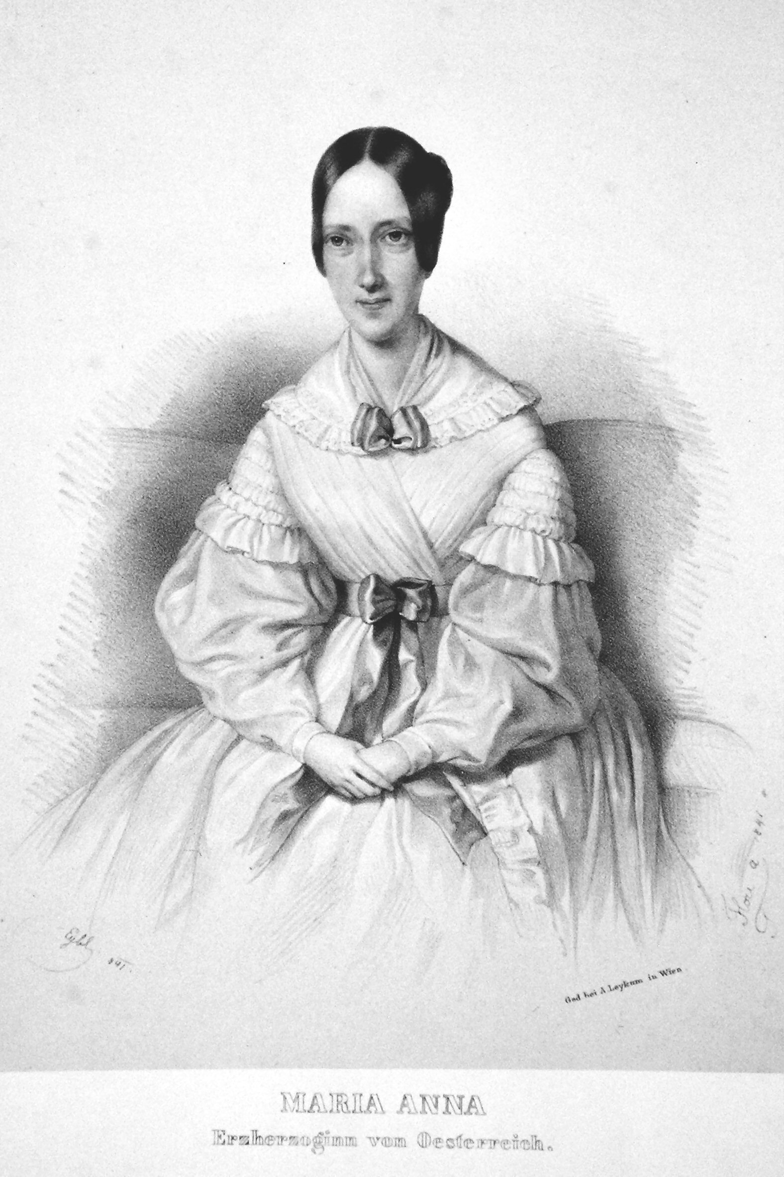 Erzherzogin Maria Anna (1804-1858), unverheiratete Tochter Kaiser Franz I.